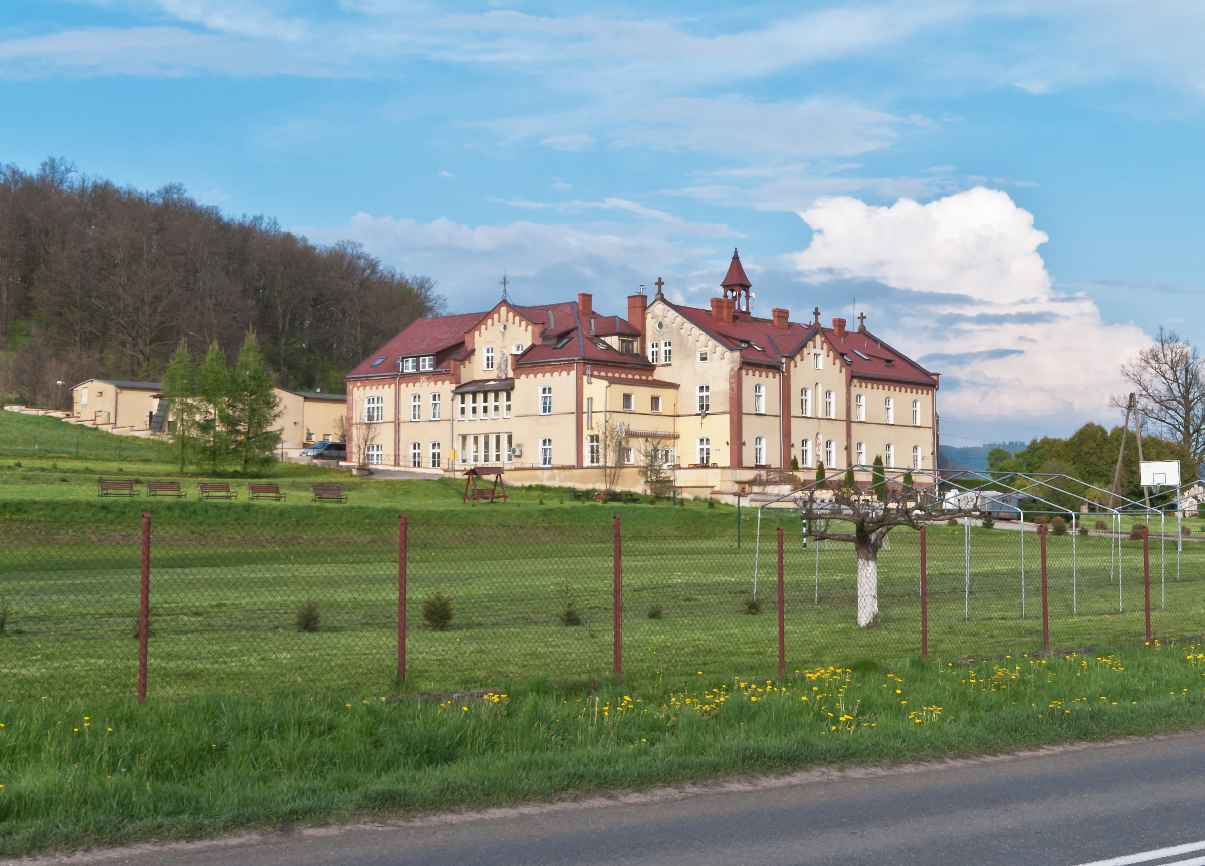 Ścinawka Dolna, dom opieki Caritas